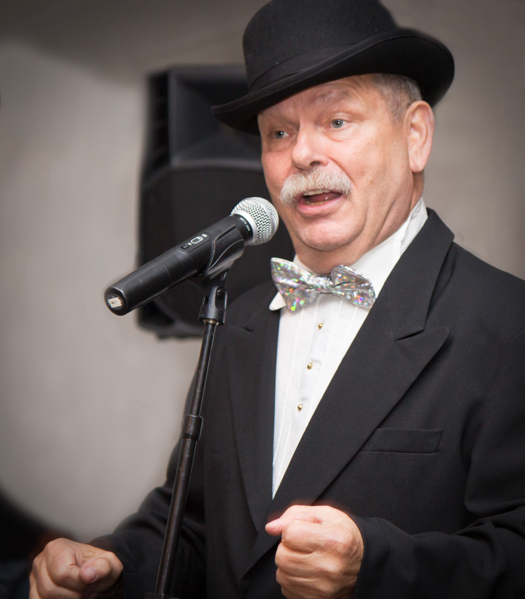 Hannes Blum, Frontmann der Gruppe „Die Blömcher“ bei einem Auftritt 2017